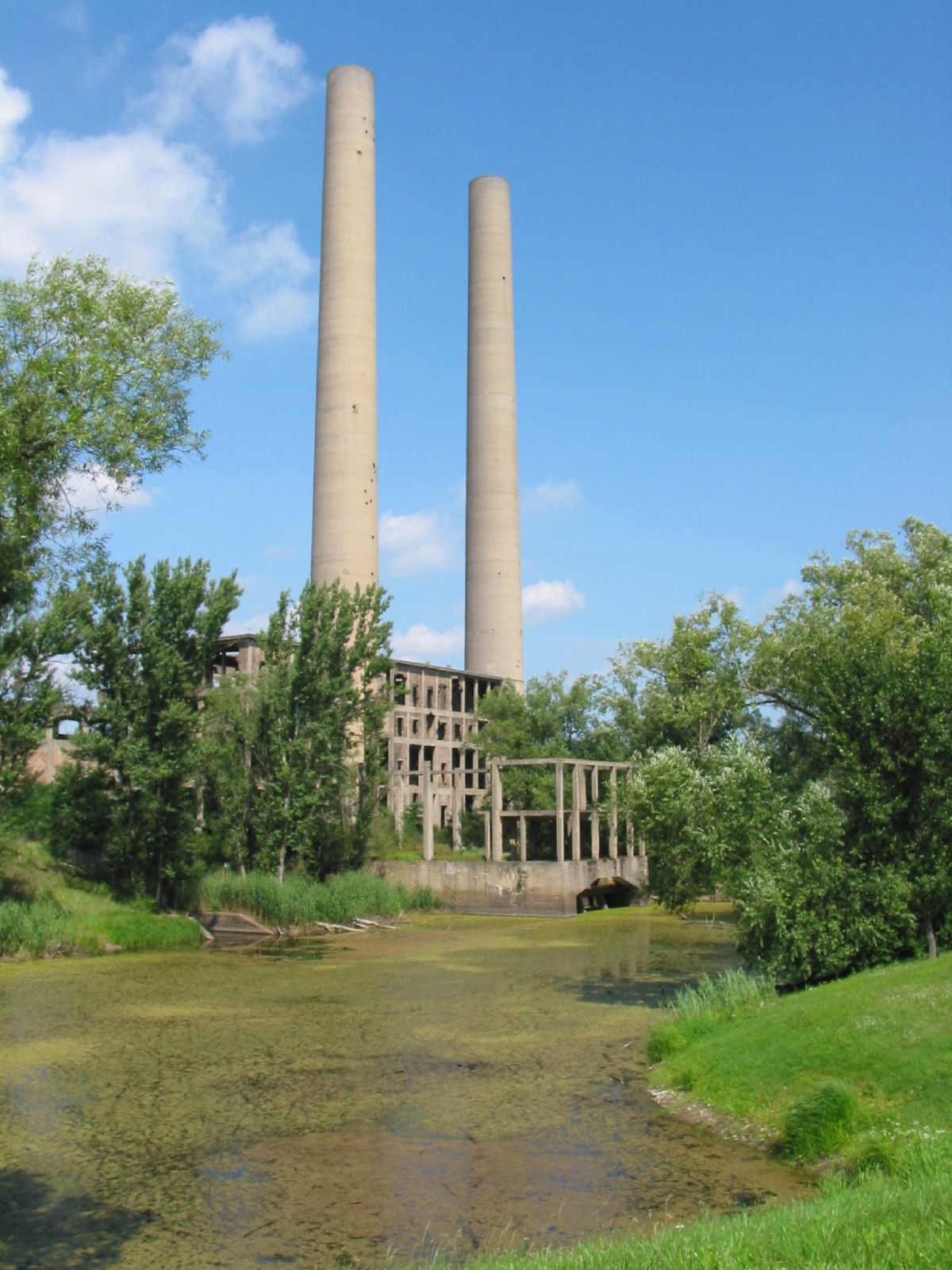 Ruine des „Kraftwerks Vogelsang“ in Fürstenberg, Eisenhüttenstadt, PDF – im Vordergrund das künstlich angelegte Einlaufbecken